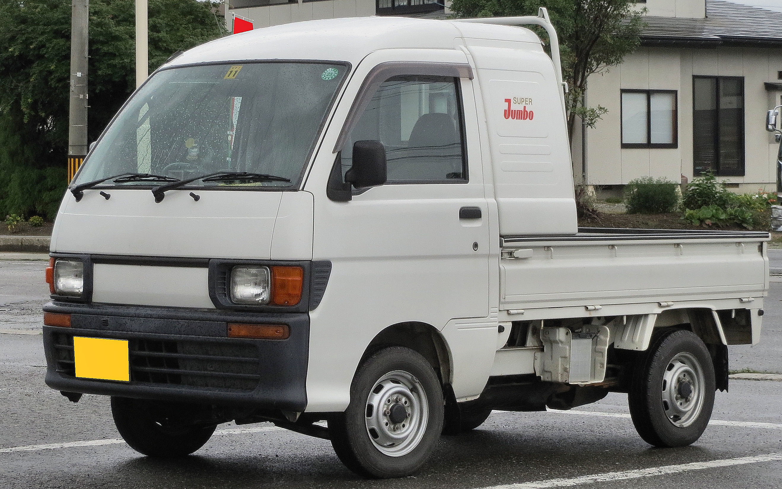 ダイハツハイゼット スーパージャンボ 4WD 5MT(8代目)